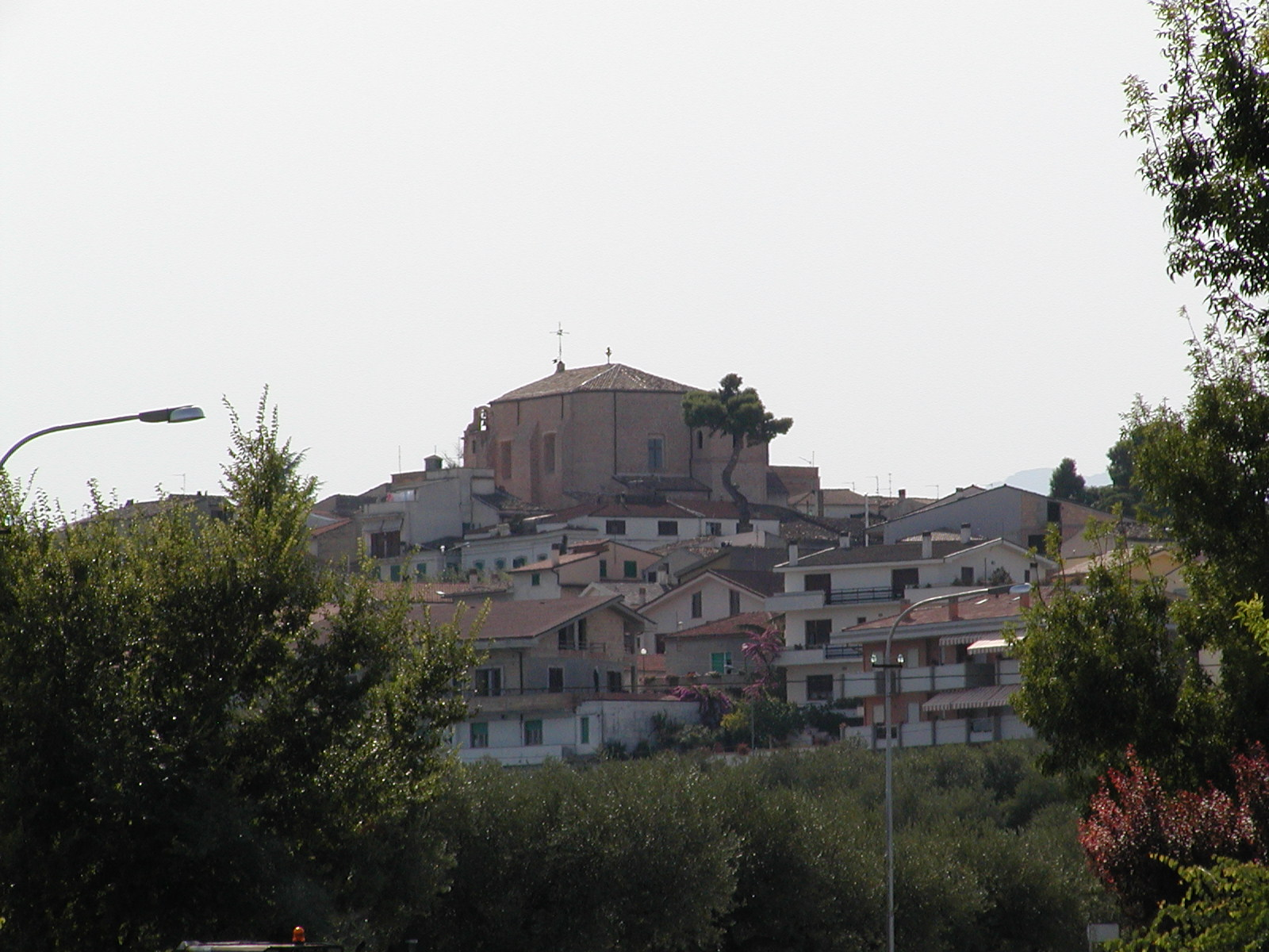 Image: Das Dorf Moscufo